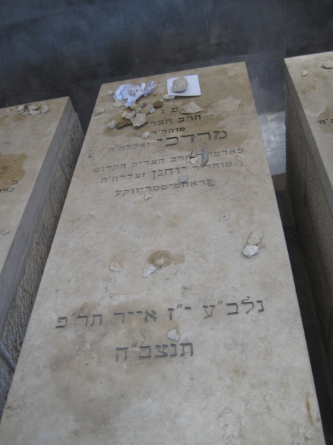 מצבתו המשוחזרת של מרדכי טברסקי